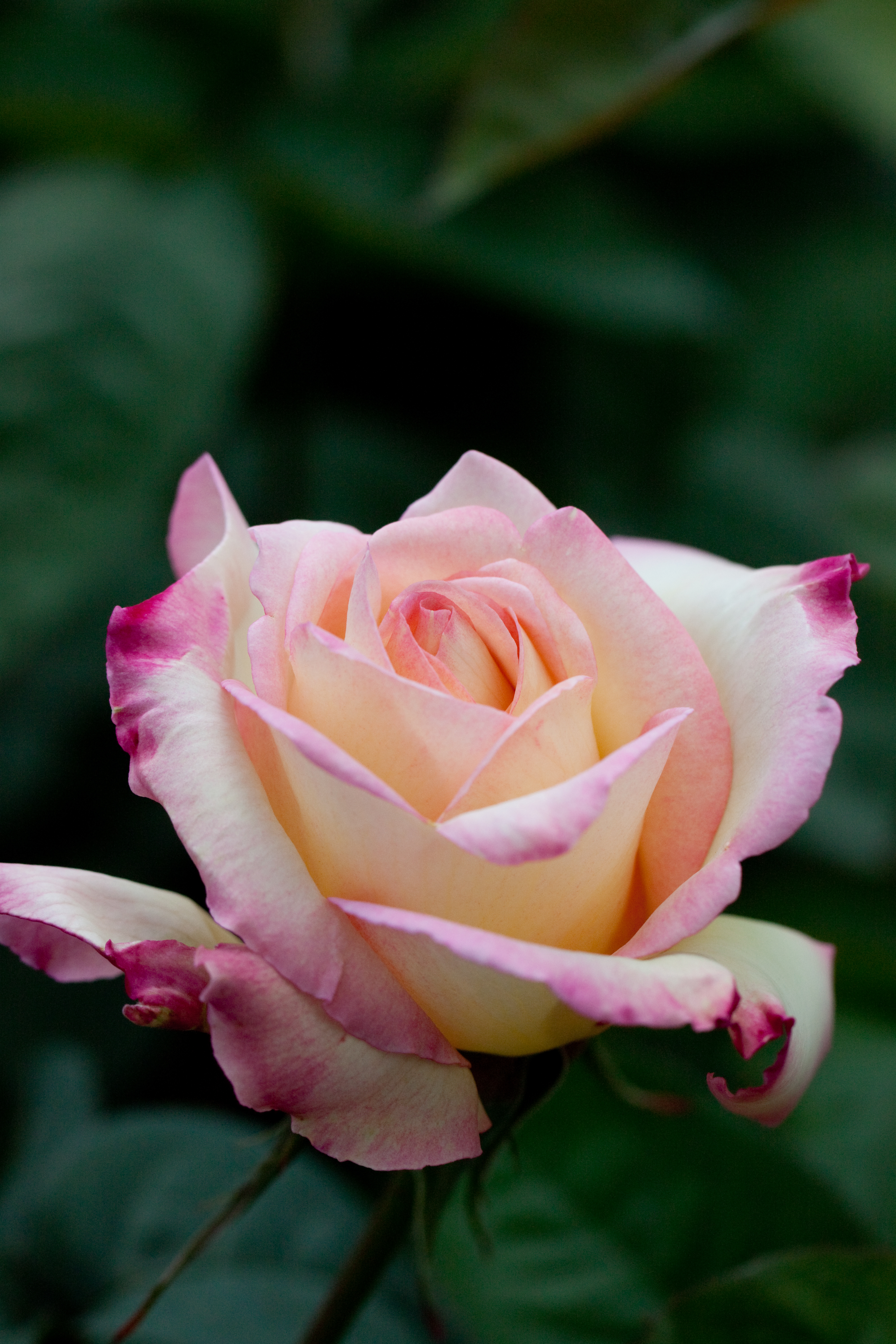 Garden Party. ガーデンパーティ。